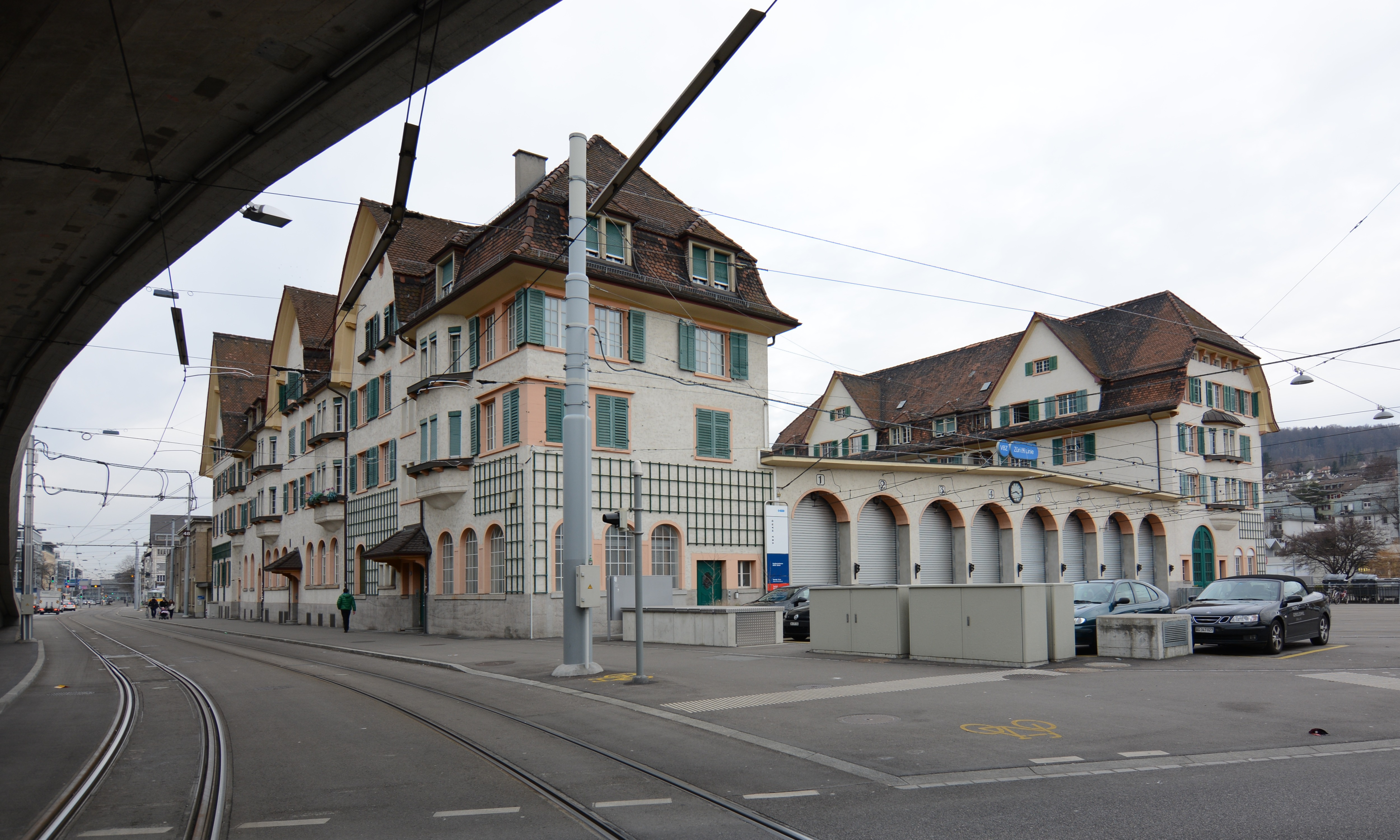 Tramdepot Hard, Zürich 1911. Architekt: Stadtbaumeister Friedrich Fissler